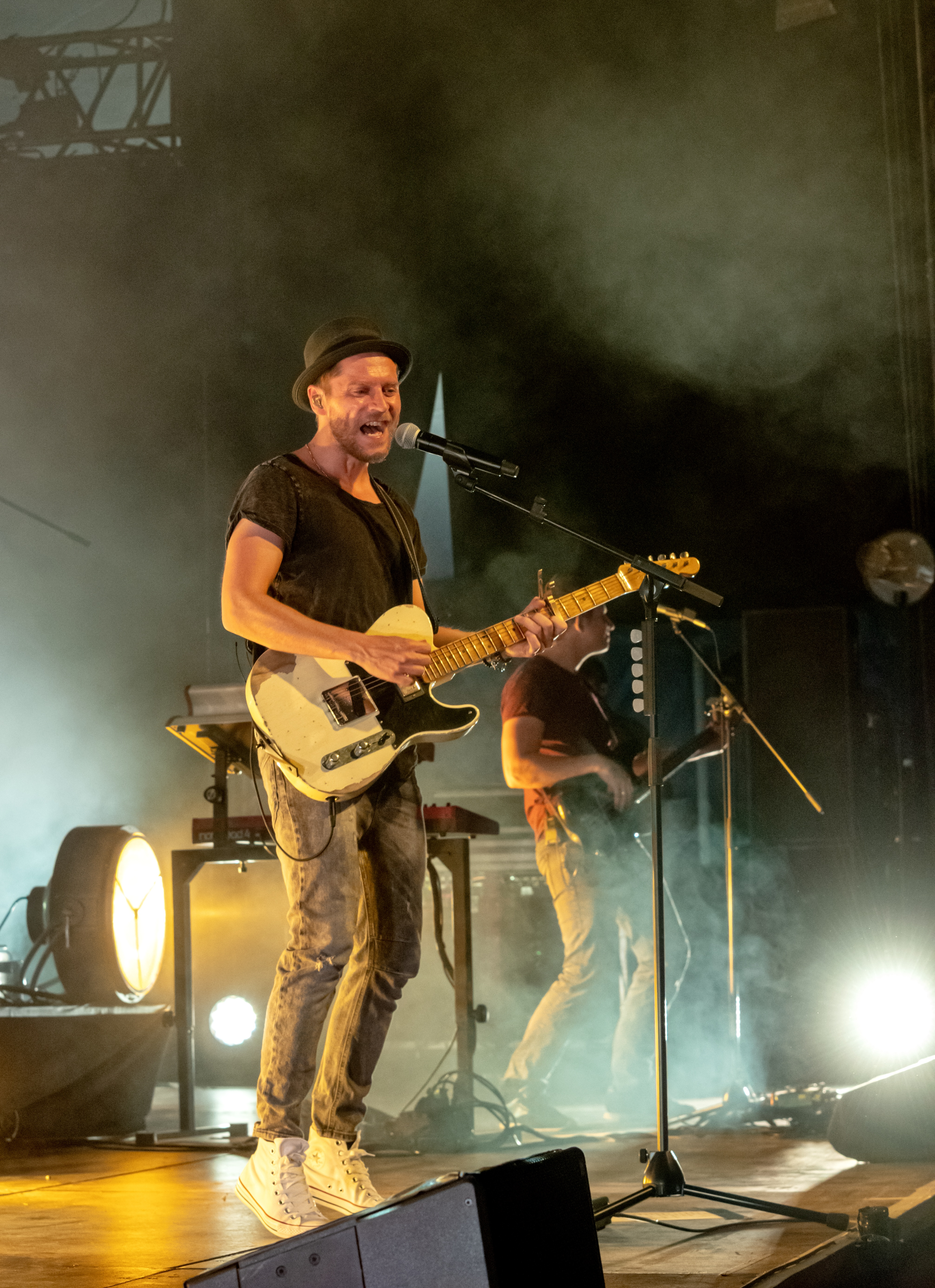 Bilder vom Zelt Musik Festival 2018 in Freiburg im Breisgau Johannes Oerding und Band am 30.07.2018